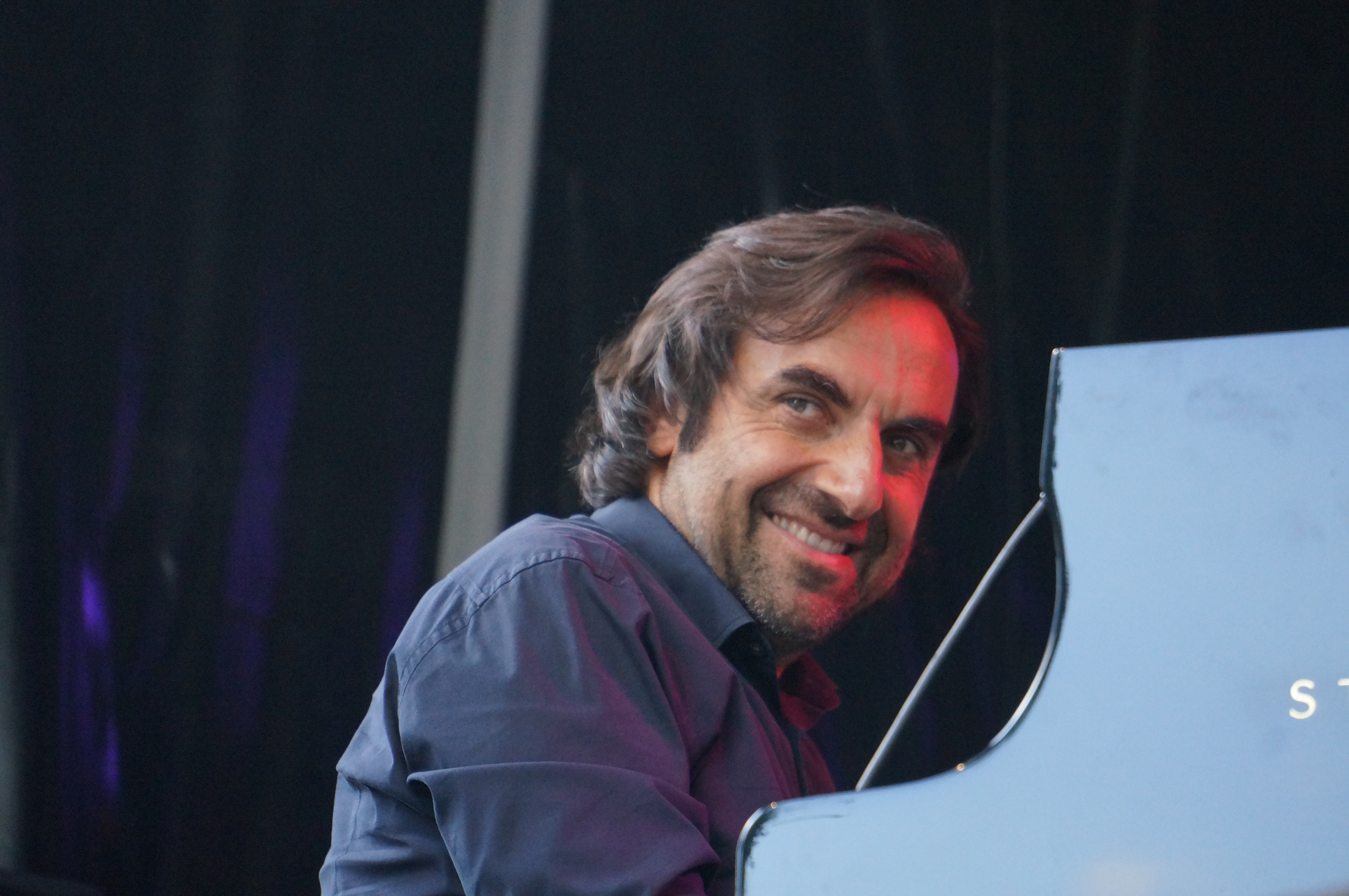 COncert lors de Art & Jazz 2014.